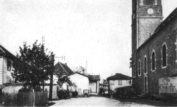 place de l'église Sainte-Blandine (Isère), carte postale ancienne.